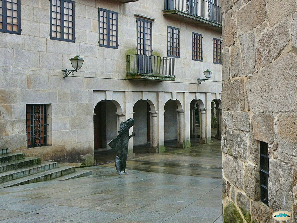 Pontevedra. Edificio do museo Fernández López e estatua a Castelao [do escultor Manuel García Vázquez (Buciños)].